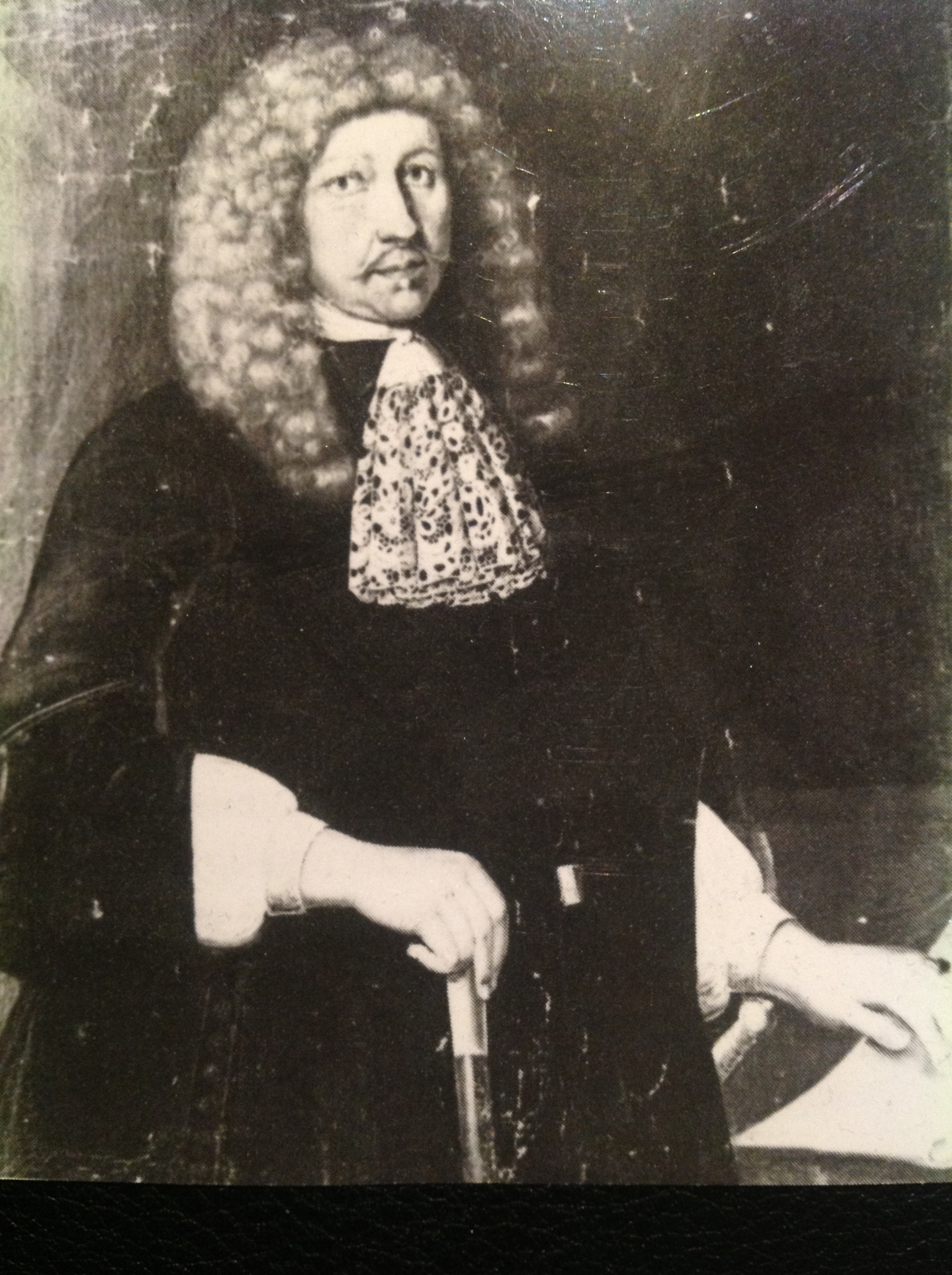 Preben von Ahnen